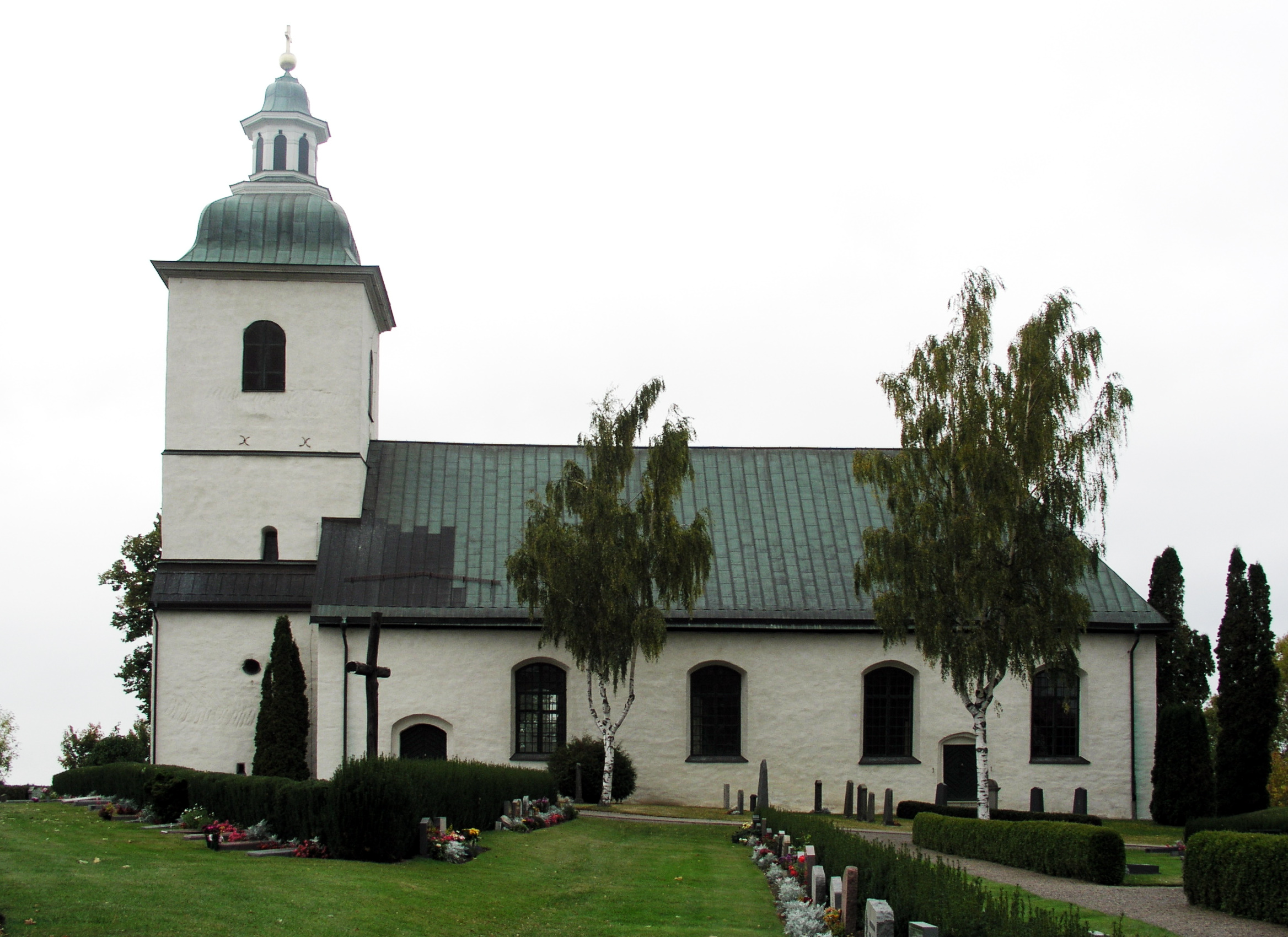 Bankekind kyrka / Bankekind church. Diocese of Linköping, Sweden.